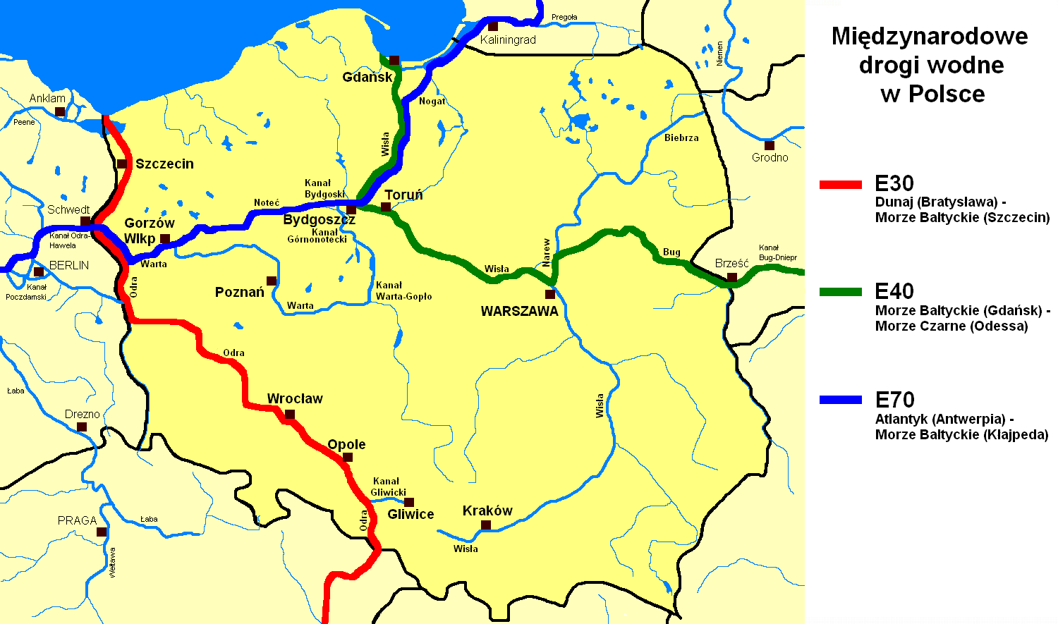 międzynarodowe śródlądowe drogi wodne w Polsce